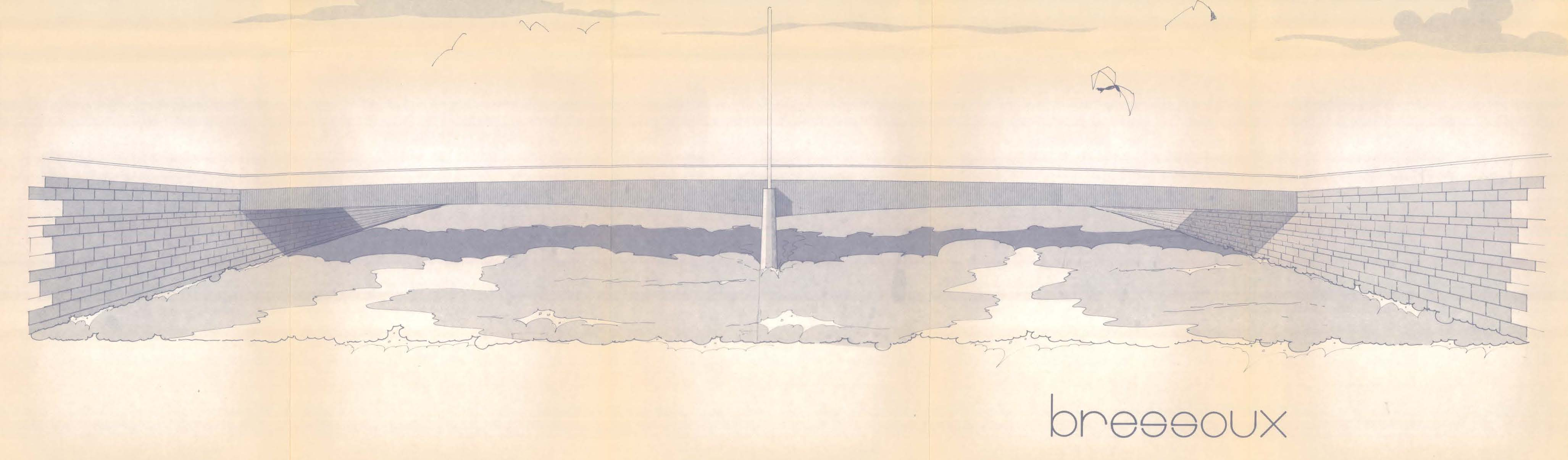 Schéma réalisé pour la Direction des Routes de Liège